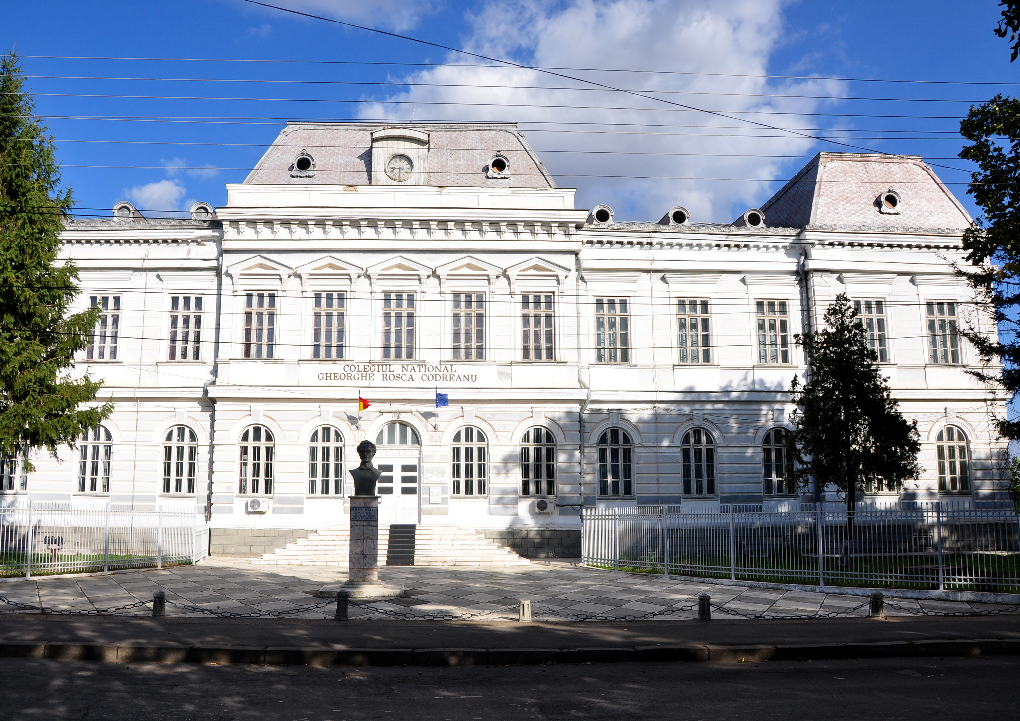 Fostul liceu de baieti „Gheorghe Rosca Codreanu”, inaugurat la data de 27 aprilie 1886, este una dintre cele mai vechi institutii de învatamant preuniversitar din Moldova.